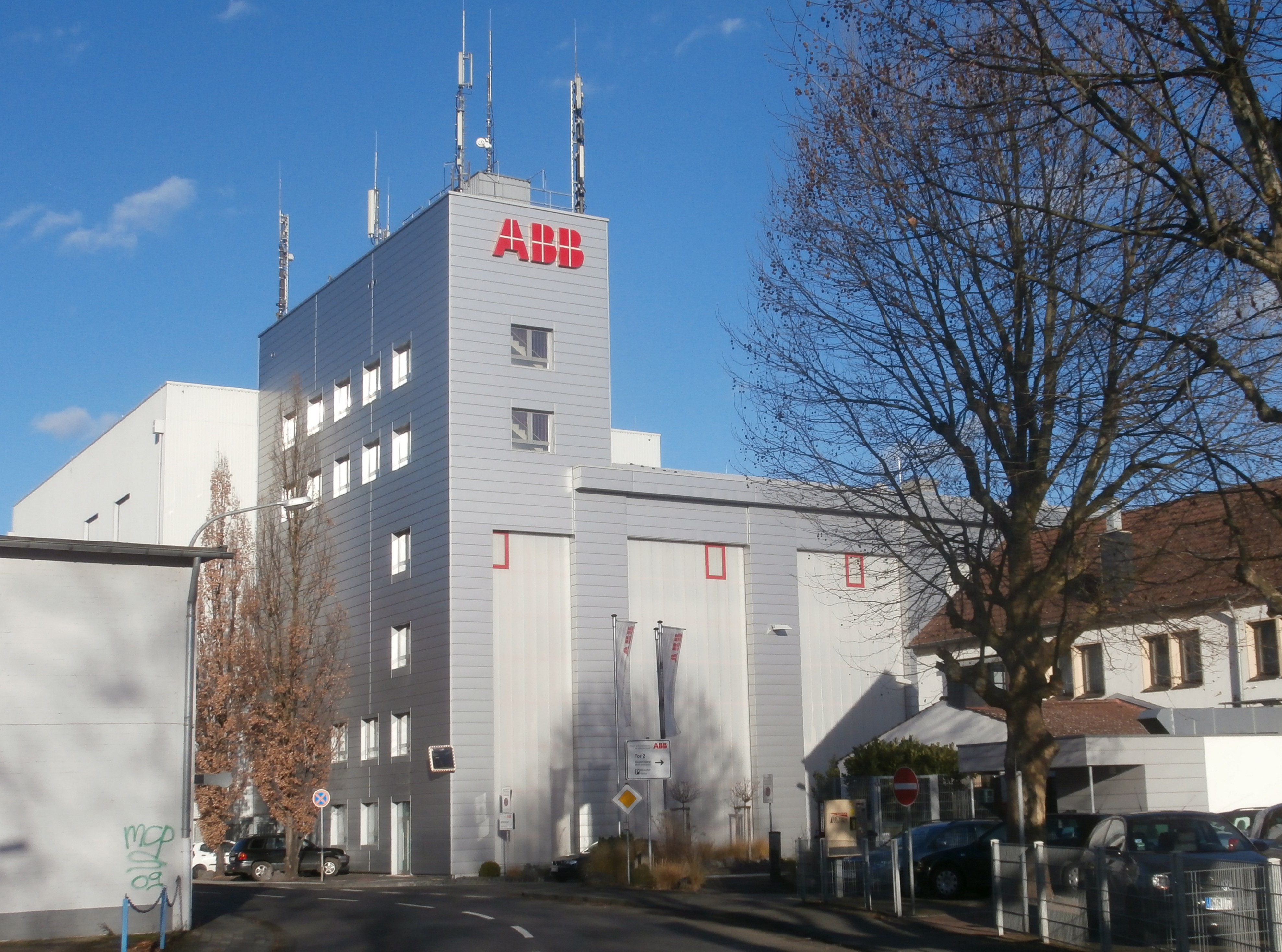 ABB, Lohfelder Straße, Lohfeld, Bad Honnef: Ansicht aus Südwesten